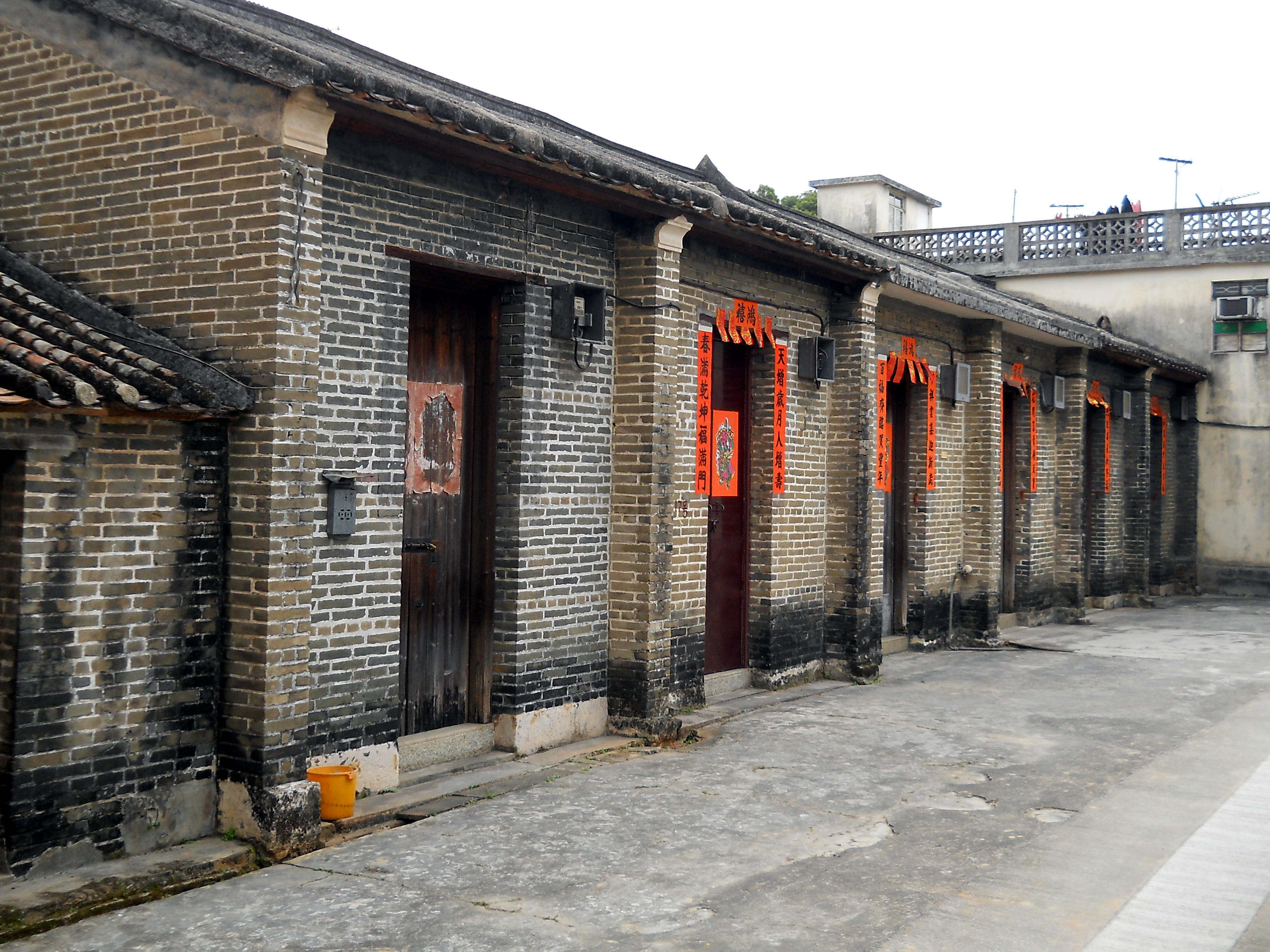 中文（香港）: 蝦尾新村13至19號